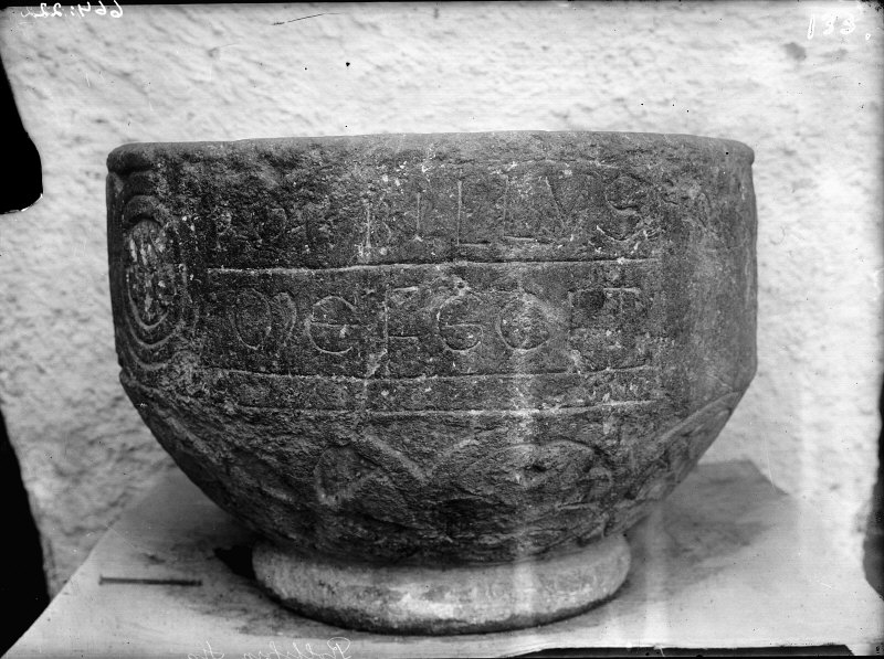 Dopfunt, täljsten, 1200-tal. Detalj. Kategori: (04) Dopfuntar Dopfunt, täljsten, 1200-tal. Detalj.